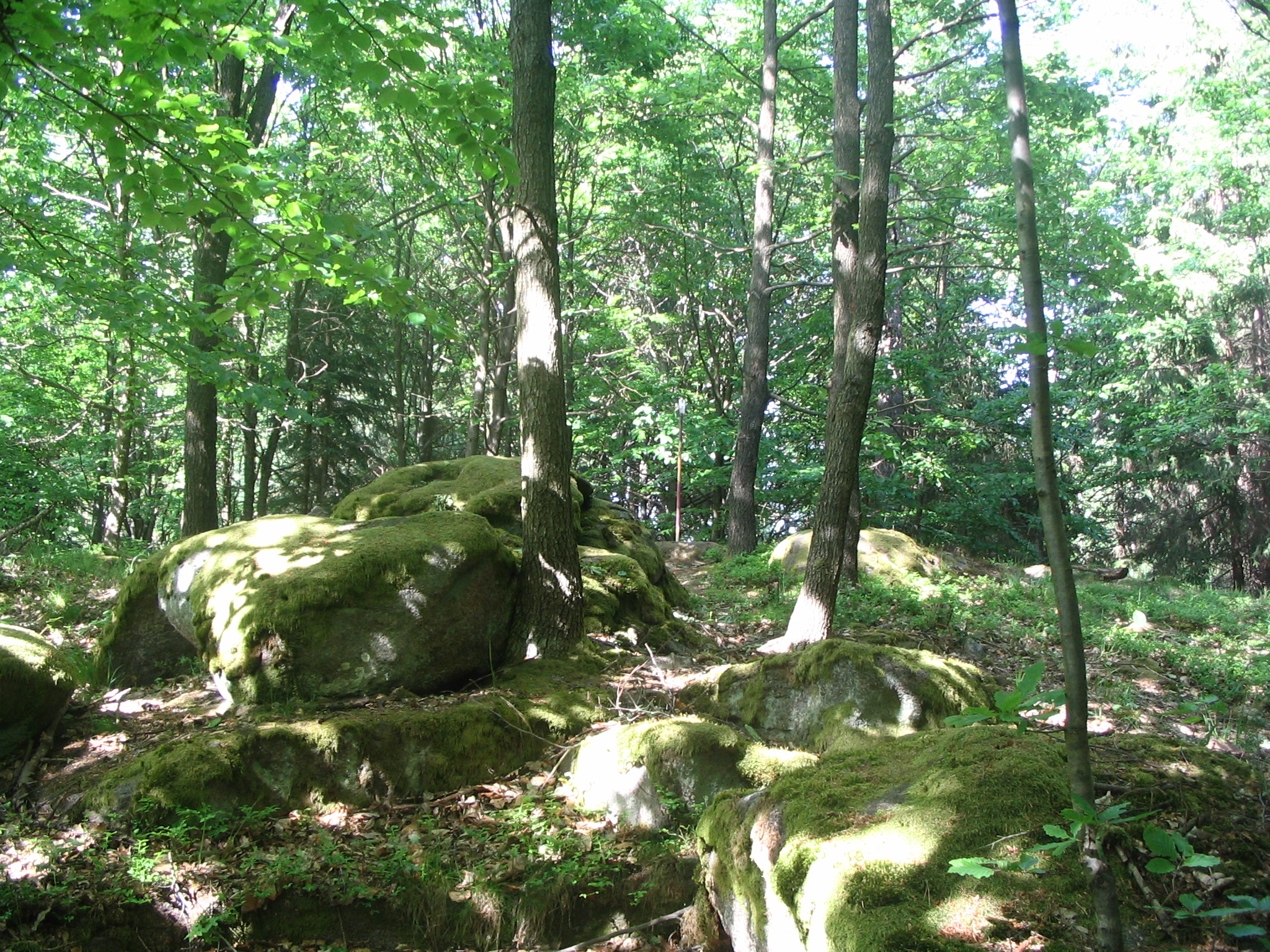 Vrchol Grybly